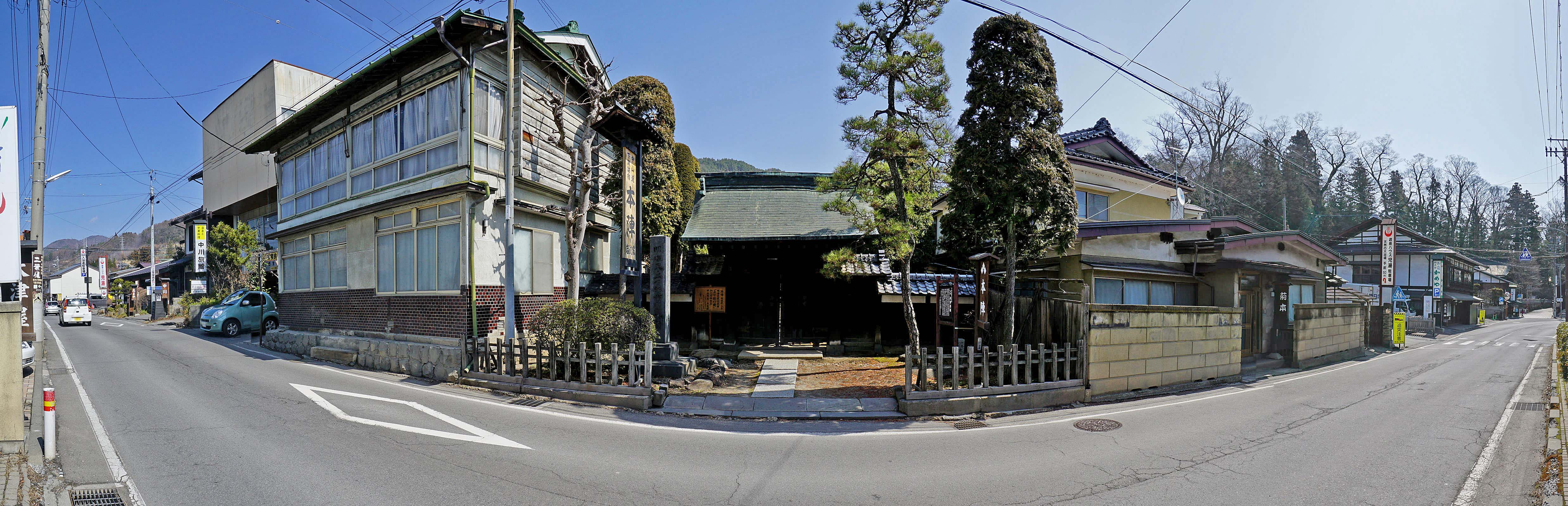 Honjin Iwanami house , 本陣 岩波家